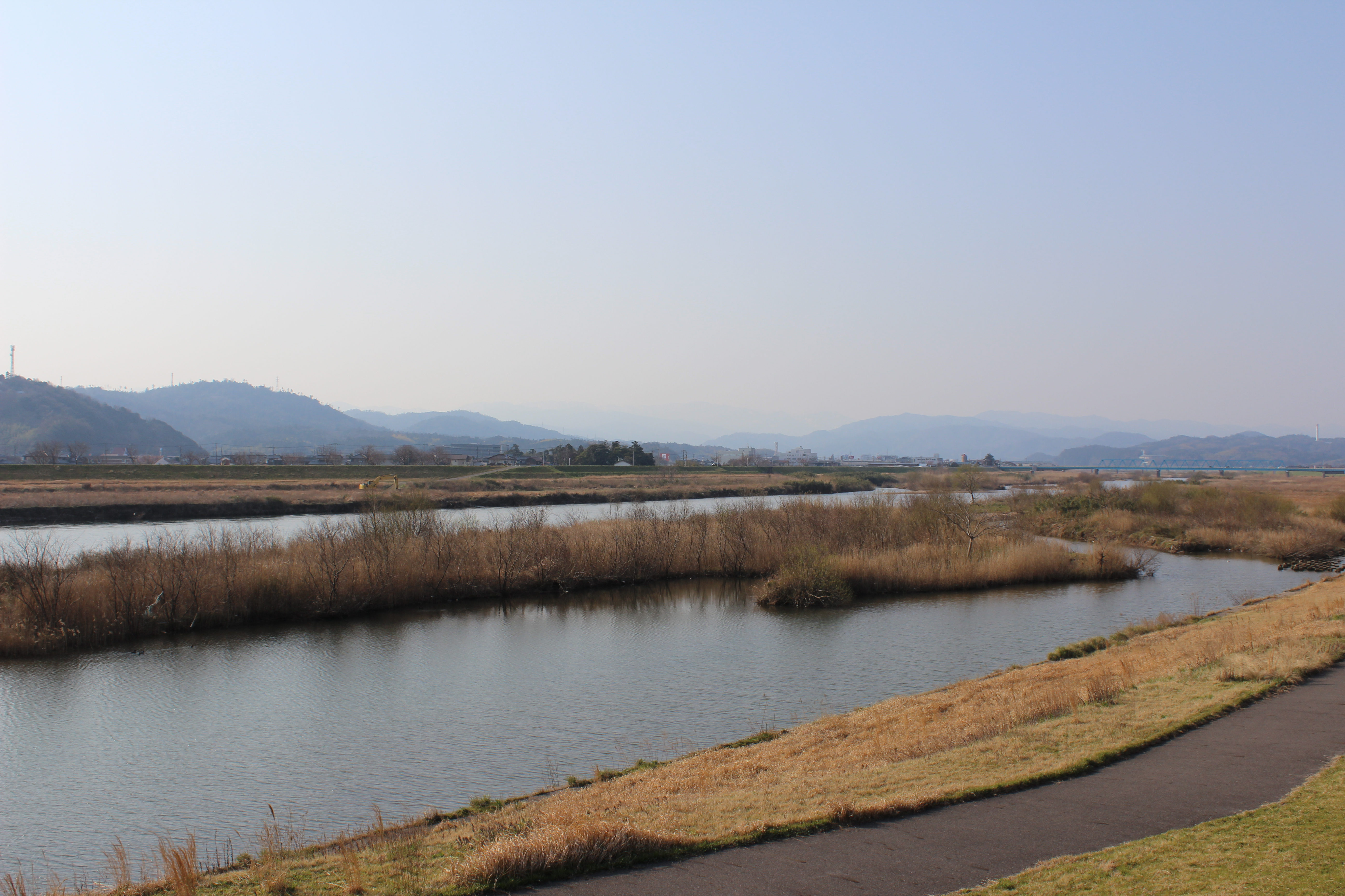 鳥取県東伯郡北栄町江北付近。上流方向の天神橋を望む。